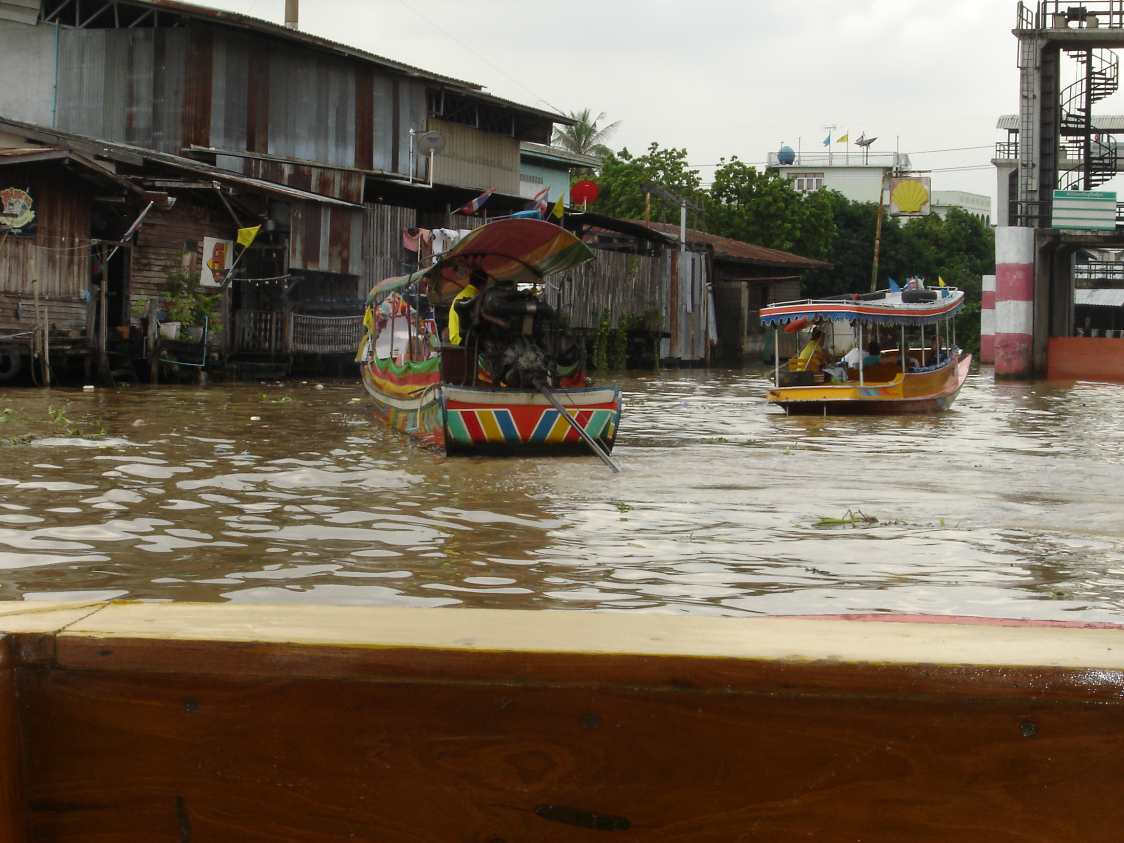 Bangkok